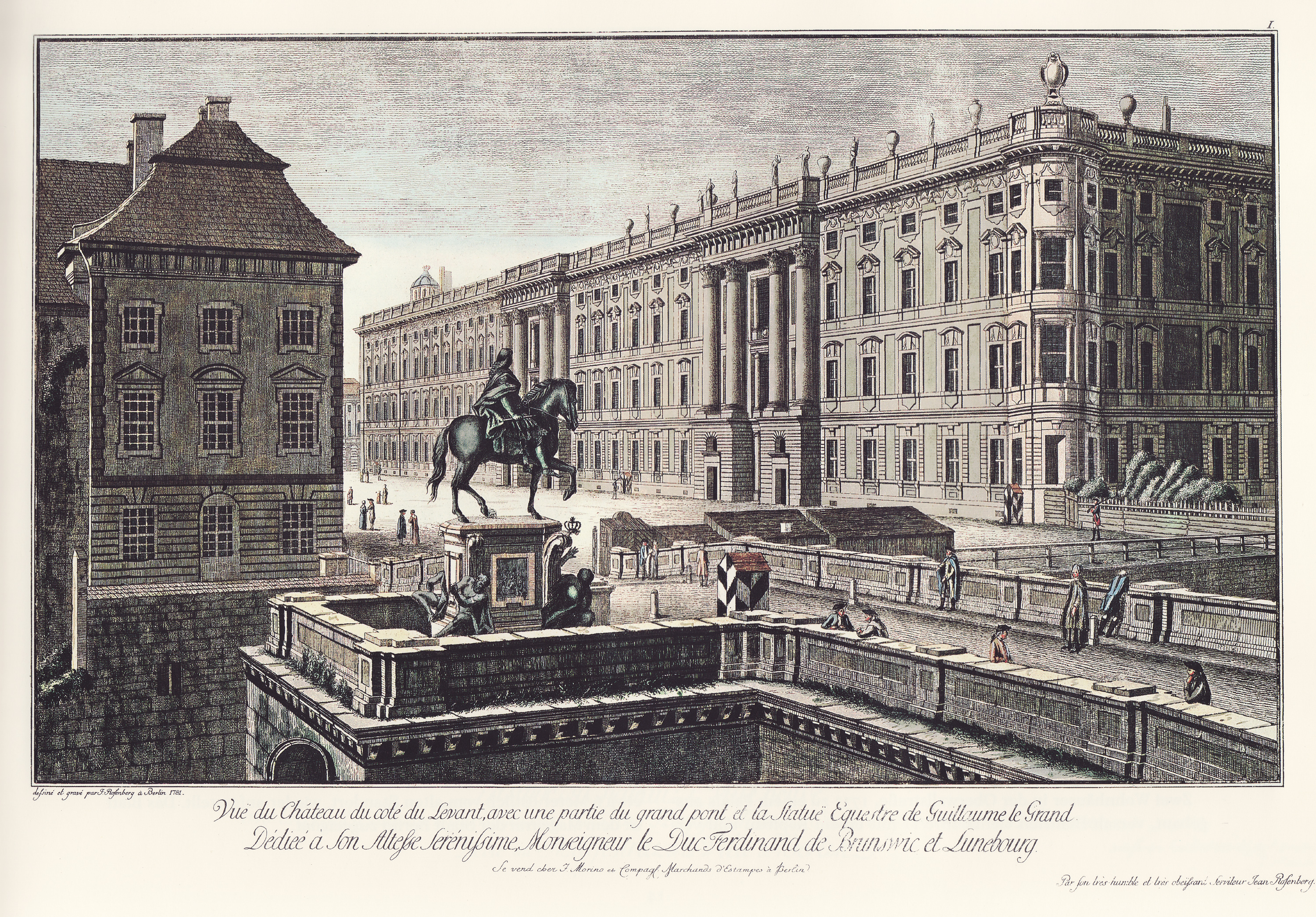 Ansicht des Schlosses mit der Langen Brücke, Alt-Berlin/Deutschland